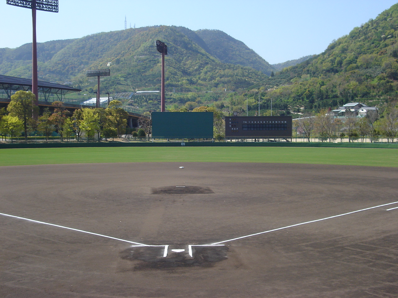 香川県営野球場。 - 日本国香川県高松市にある競技場。